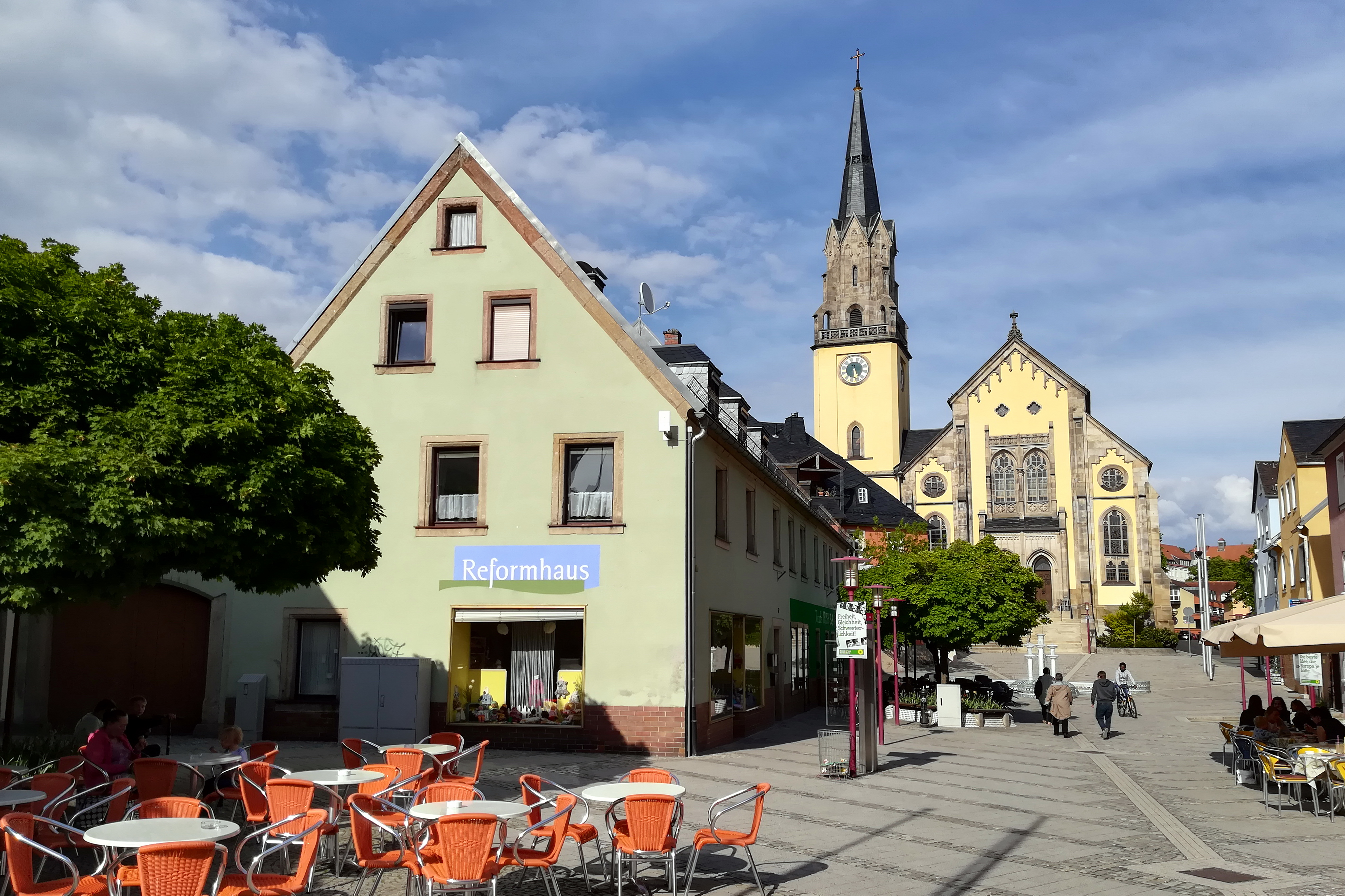 Die Stadtkirche St. Andreas wurde nach dem verheerenden Selber Brand 1856 an dem Standort der alten Stadtkirche, nicht jedoch auf deren Fundament errichtet.